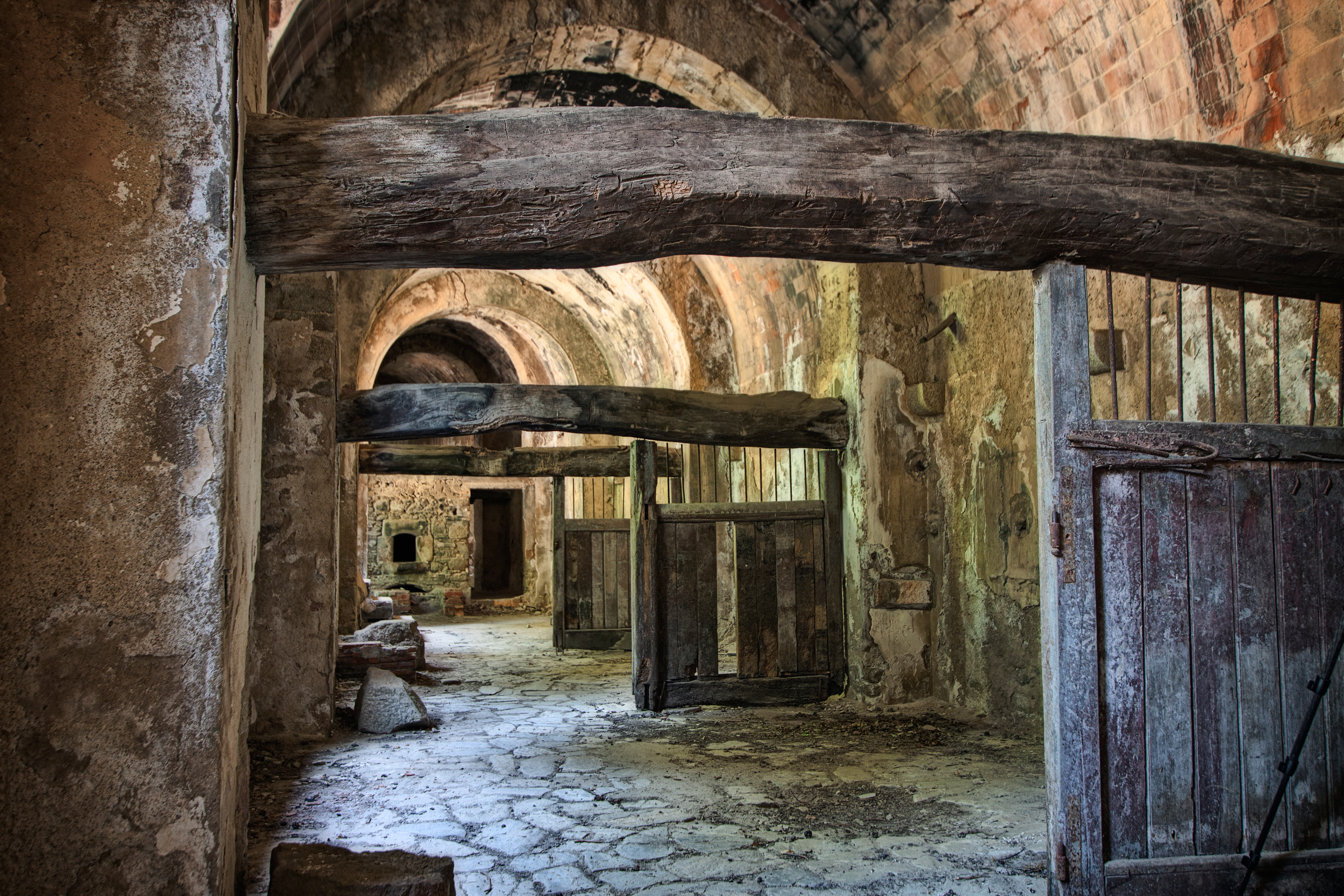 Interior castell de Requesens